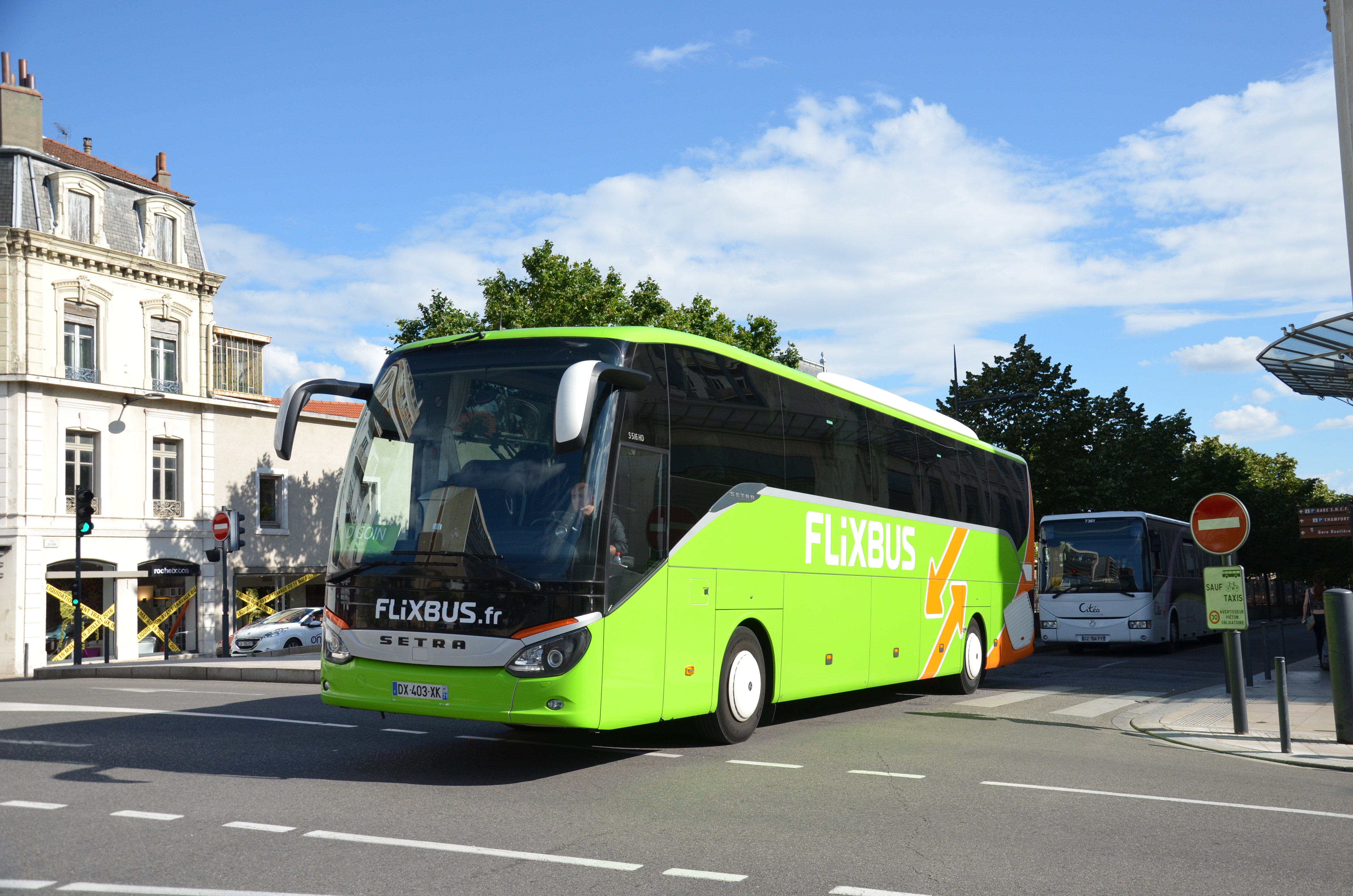 Autocar Setra S 516 HD de Flixbus, à Valence (France).